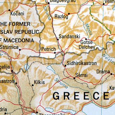 Petritsch - Lage des Ortes in Bulgarien